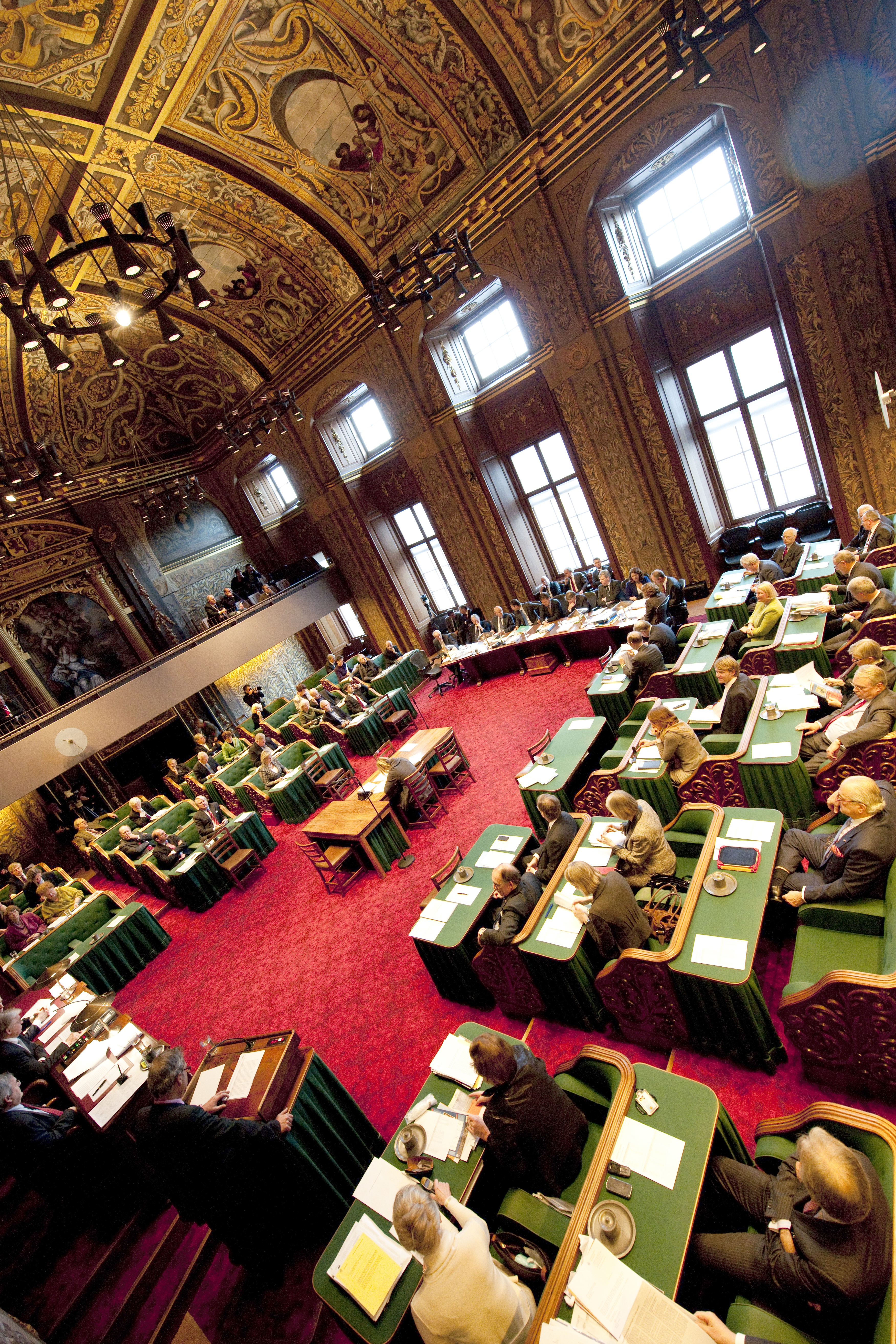 De vergaderzaal van de Eerste Kamer tijdens het debat over de regeringsverklaring.